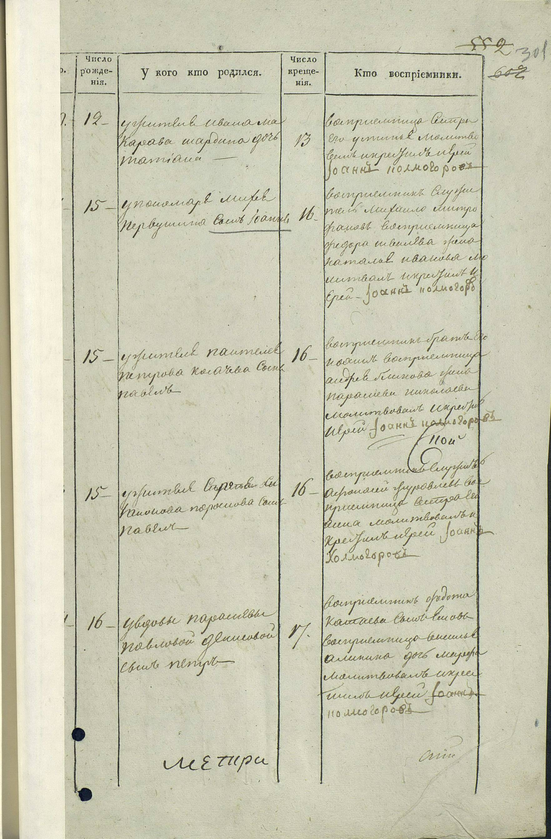 ГАПК Ф.37.Оп.1.Д.55а Метрическая книга Троицкой церкви Лысьвенского завода 1827-01-15 (о рождении Первушина Иоанна Михеевича) "У пономаря Михея Первушина сын Иоанн"